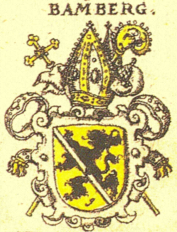 Wappen des Bistums Bamberg nach Siebmachers Wappenbuch